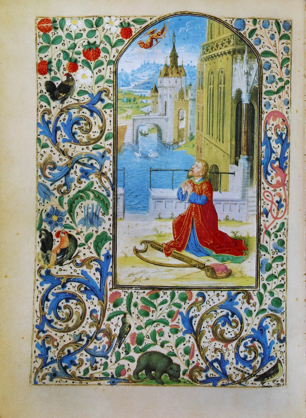 Wien, Österreichische Nationalbibliothek, cod. 1857, Stundenbuch der Maria von Burgund. In: Franz Unterkirchner (Hrsg.): Das Stundenbuch der Maria von Burgund. Codex Vindobonensis 1857 der Österreichischen Nationalbibliothek (Glanzlichter der Buchkunst), Darmstadt 1993.